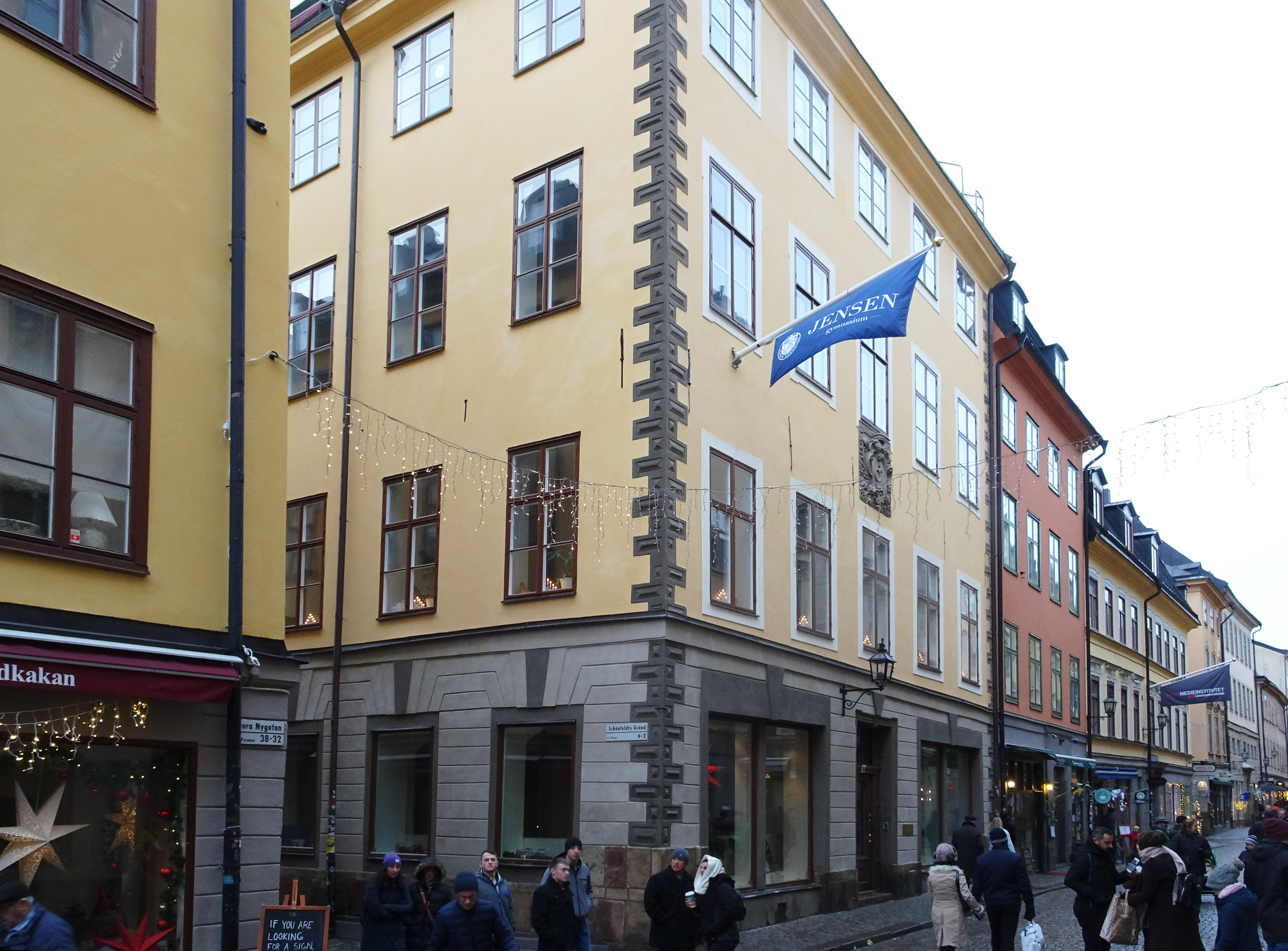 Schönfeldtska huset Gamla stan. Sedan september 2017 har Jensen Gymnasium Södra sina lokaler här